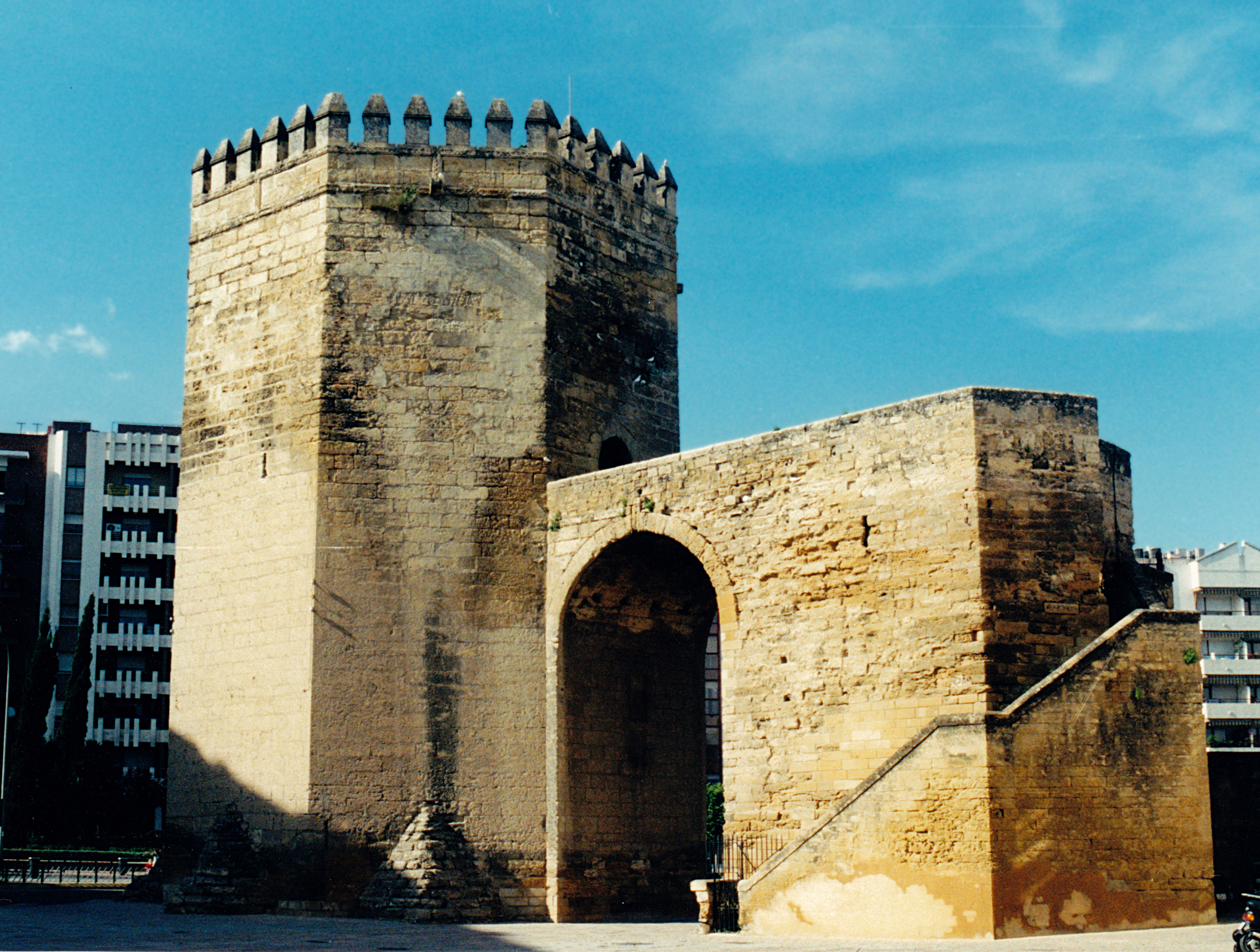 Cordoue - Tour de la Malmuerta (style mudéjar)